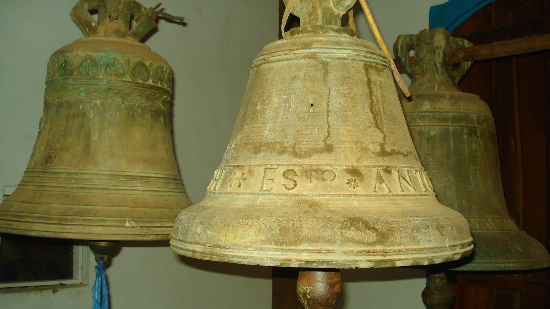 Sinos da Igreja de Nosso Senhora do Bonfim em Pirenópolis